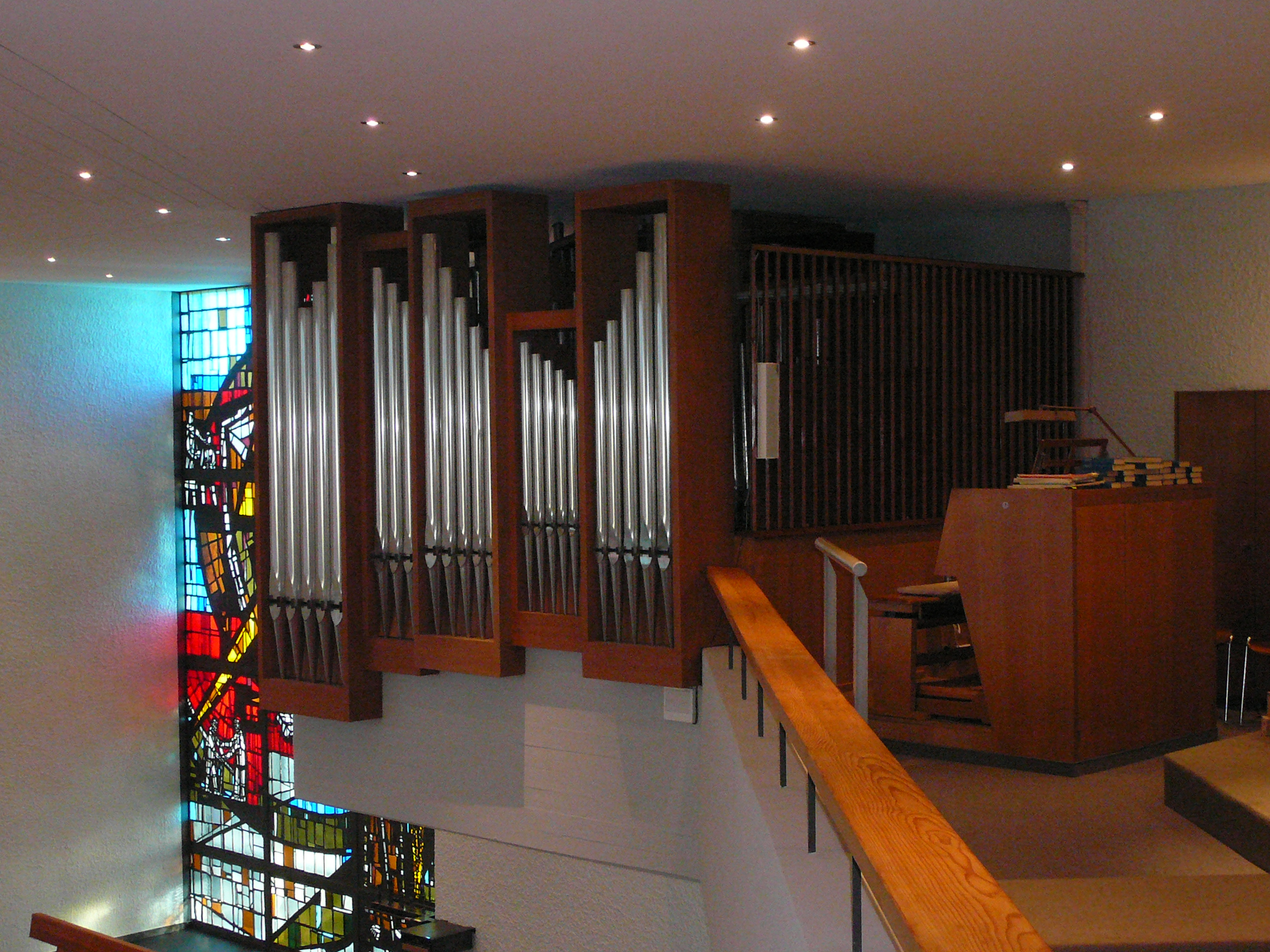 Römisch-katholische Pfarrkirche Bruder Klaus Urdorf, Hauptorgel